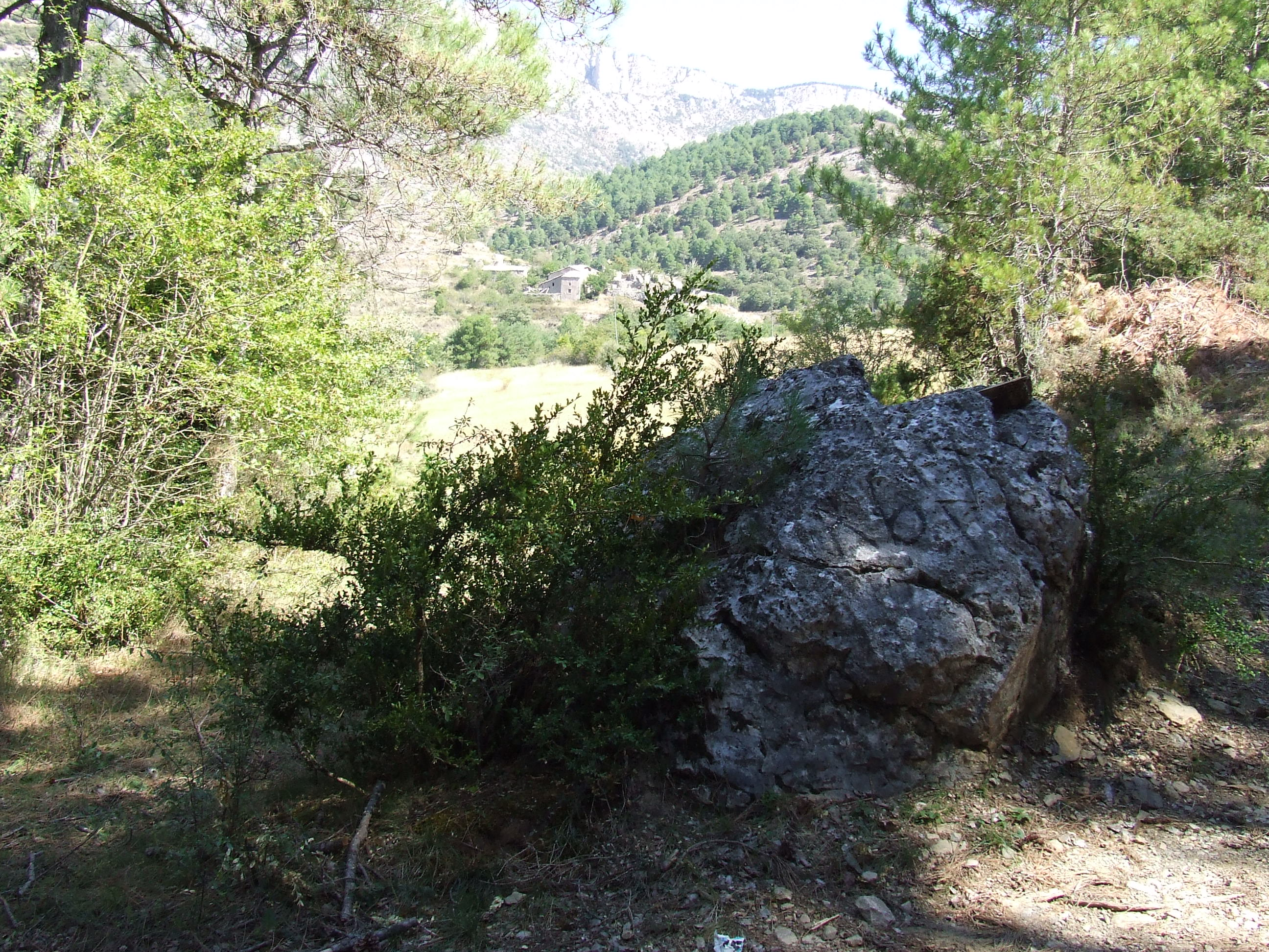 El Roc de l'Arreposador (la Torre d'Eroles, Abella de la Conca, Pallars Jussà)